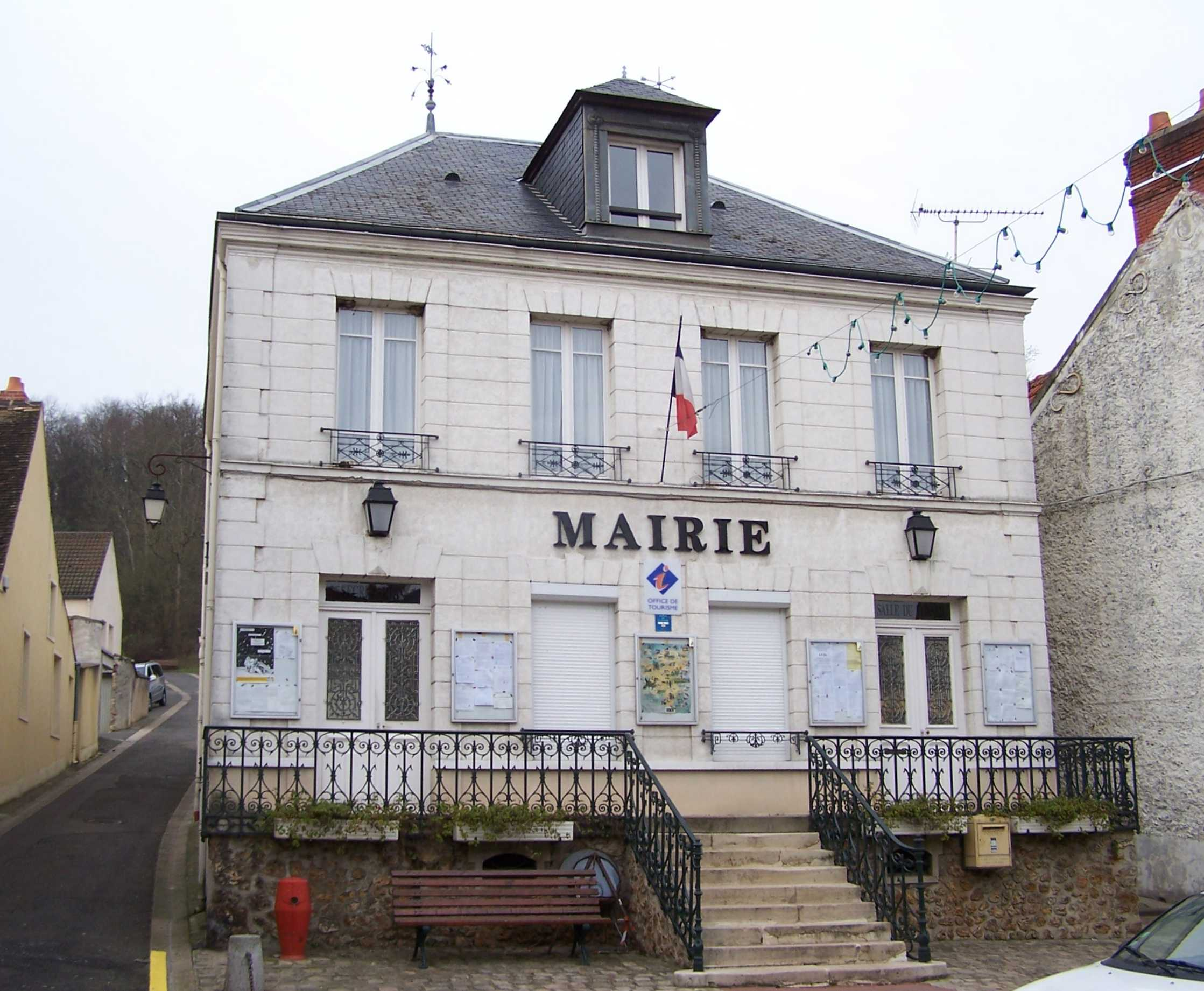 Mairie de Dampierre-en-Yvelines (Yvelines, France)